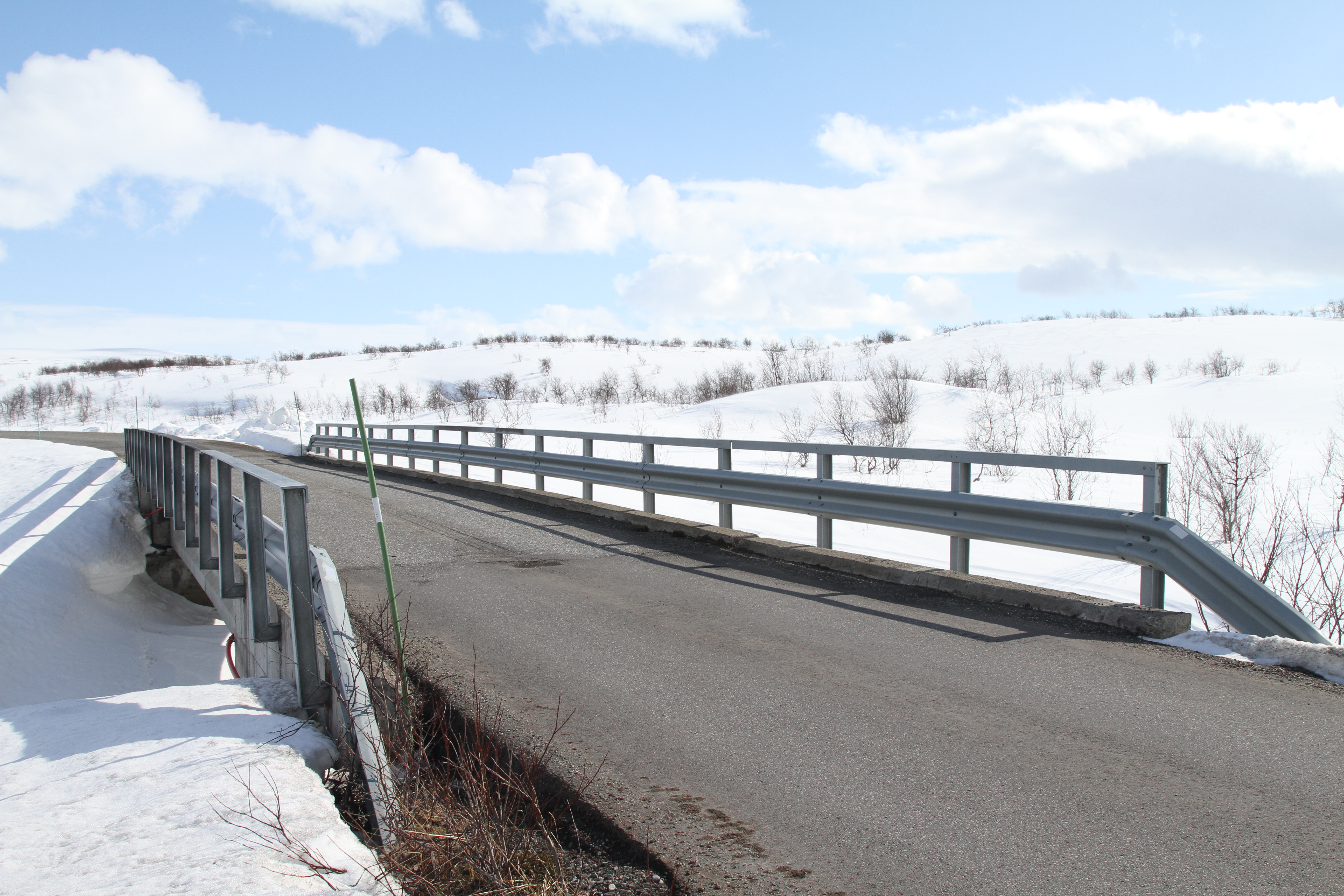 Bro i Övre Stilla, Alta. Kallad för "Somby-brua" efter att Niillas Somby, John-Reier Martinsen och en tredje icke namngiven man, detonerat dynamitladdningar i närheten 19 mars 1982. Foto från april 2012.